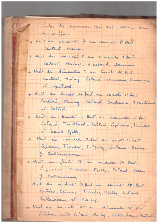 Espeleologia espedizio gehienetan bezala, La Vernaren aurkikuntza talde osoaren lanaren ondorioa izan zen. 1953ko esplorazioko kontrol orri honetan, taldekideen izenak ikus ditzakegu (egilea: Corentin Queffelec).